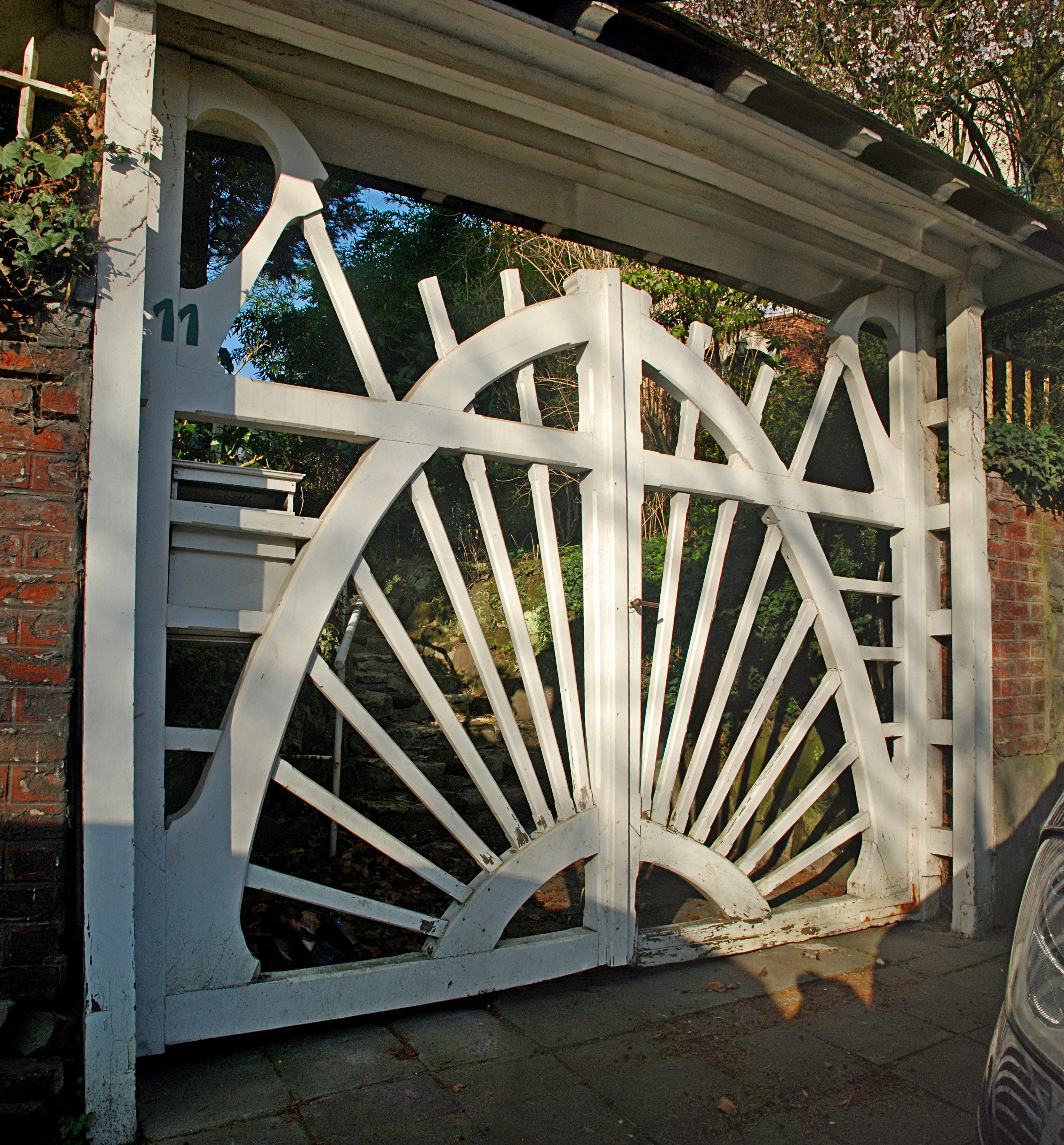 Belgique - Bruxelles - Watermael - William Jelley - Villa Art nouveau - Avenue des Taillis 11 - Portail